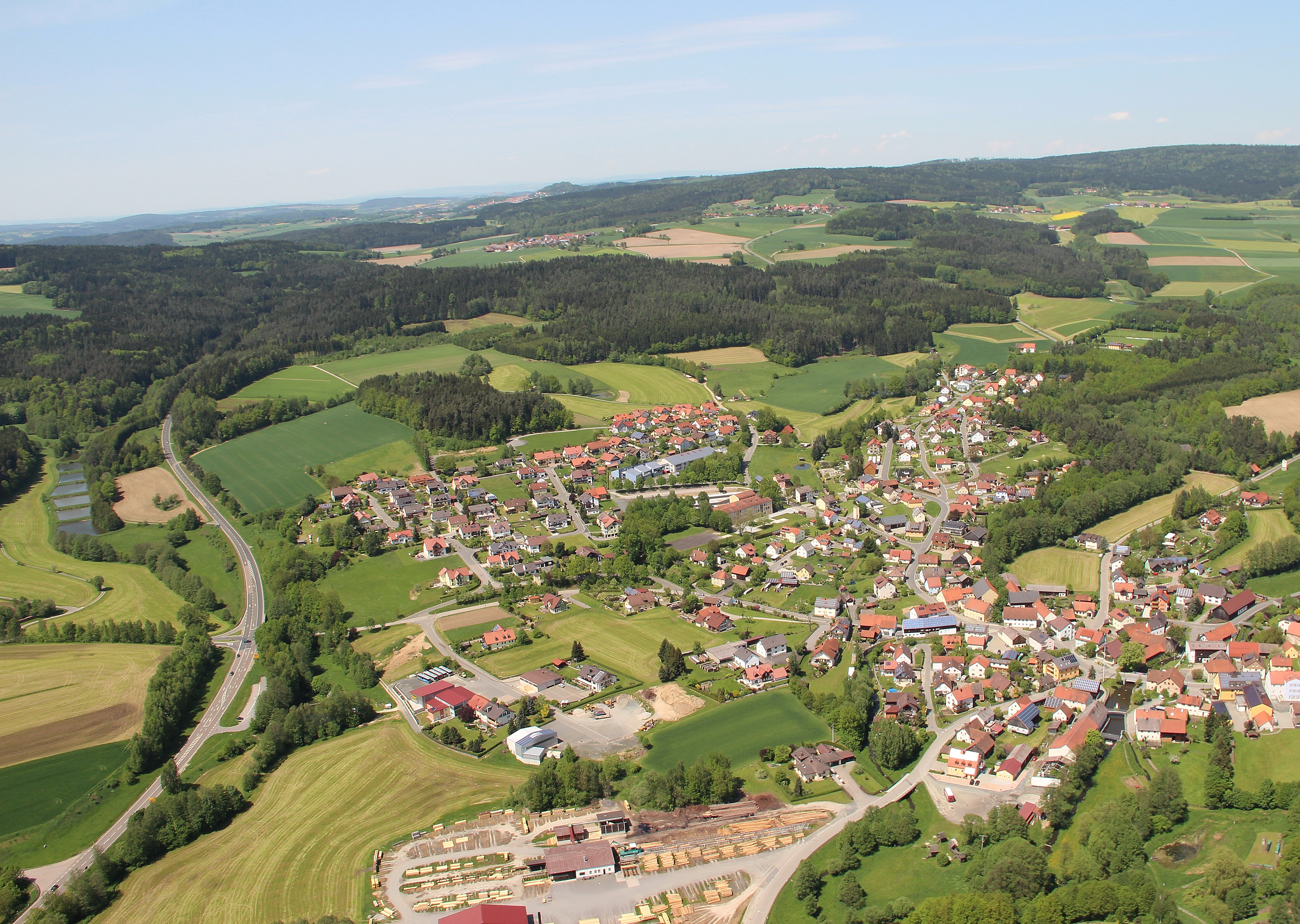 Teunz, Landkreis Schwandorf, Oberpfalz, Bayern (2013)